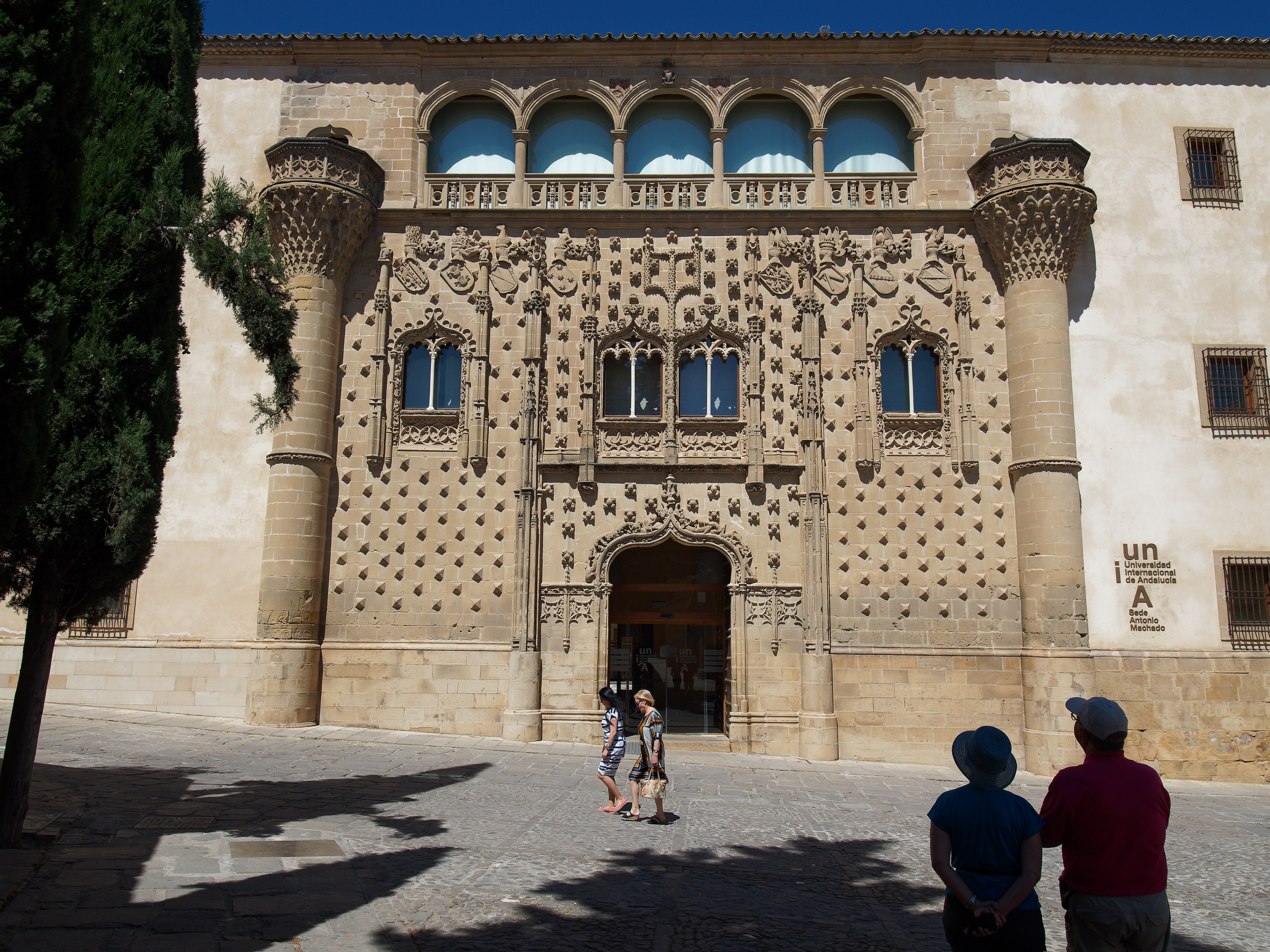 Palacio de los Marqueses del Jabalquinto Fassade des Renaissancepalastes in Baeza, Andalusien, Spanien. Maurische Schmuckdetails